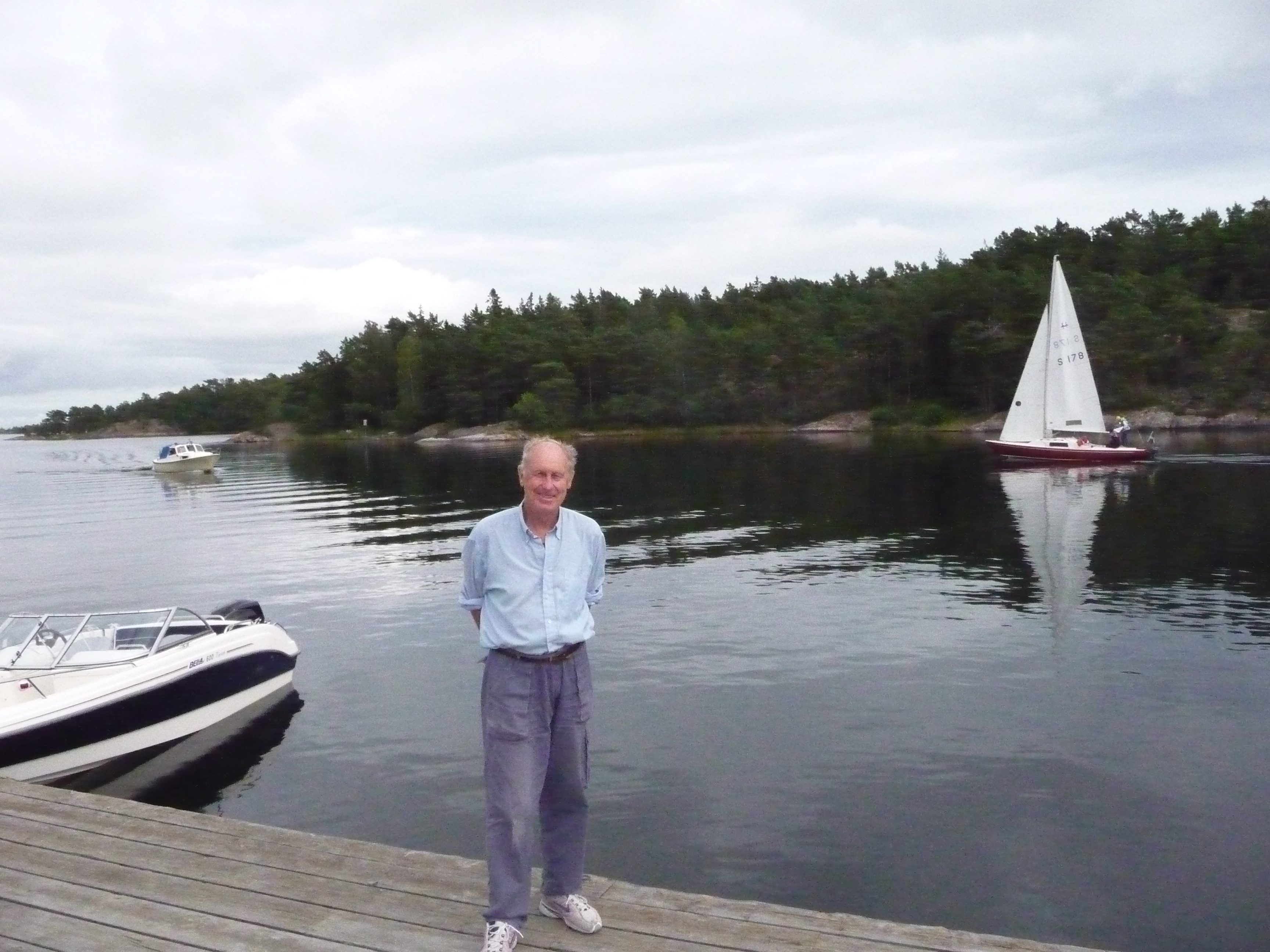 Historikern Hans Norman, på Runmarö augusti 2009.